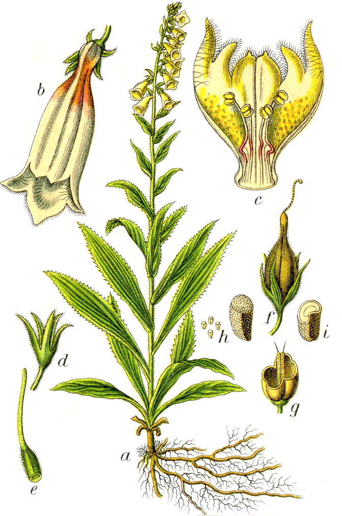 Digitalis grandiflora Mill. Original Caption Grosser gelber Fingerhut, Digitalis grandiflora